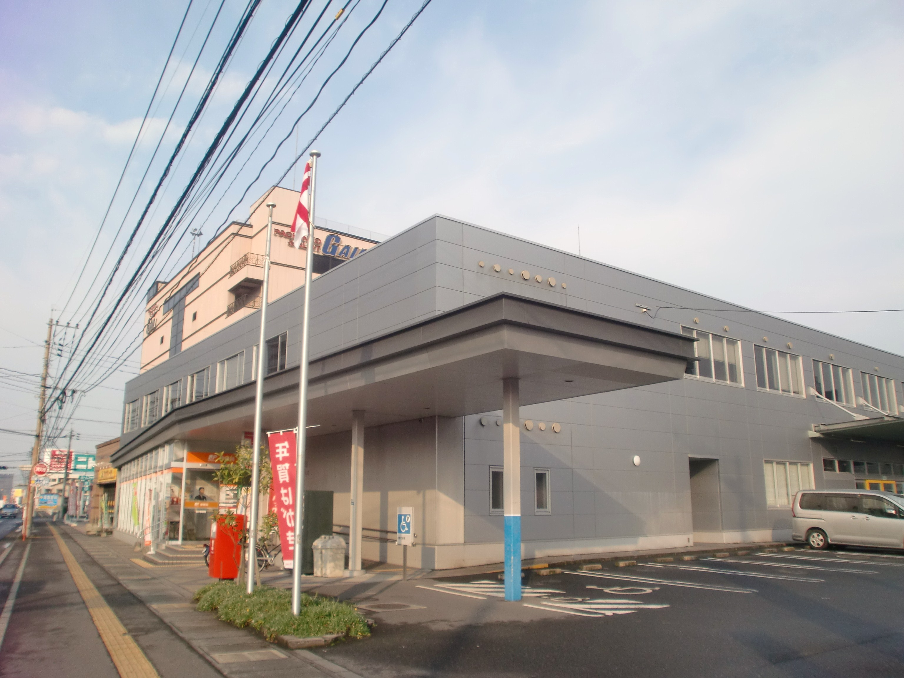 国分郵便局の外観。